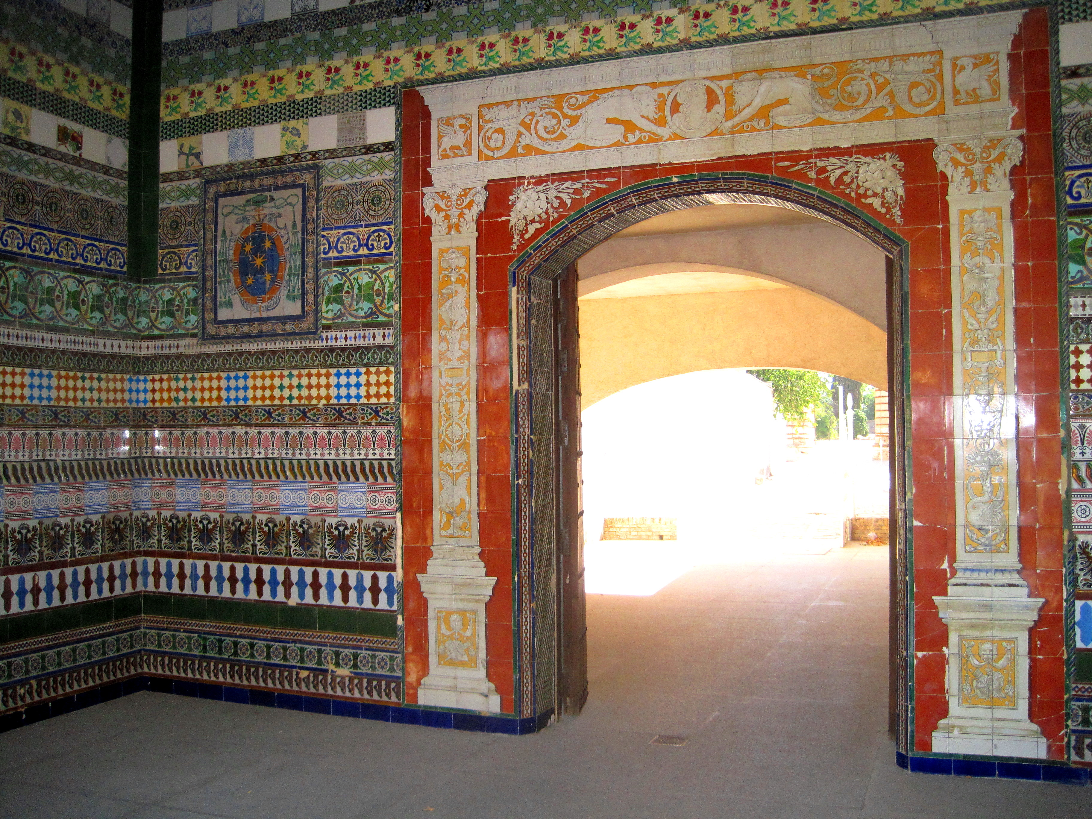 Sección 1.4 Fábrica de loza.